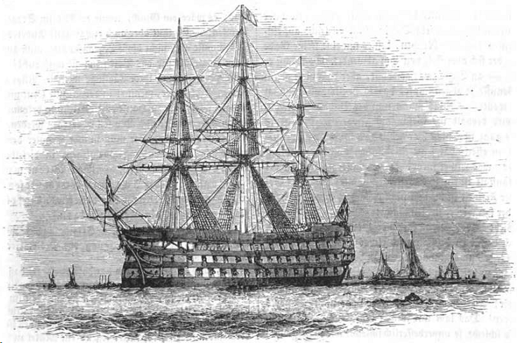 Der Camperdown.